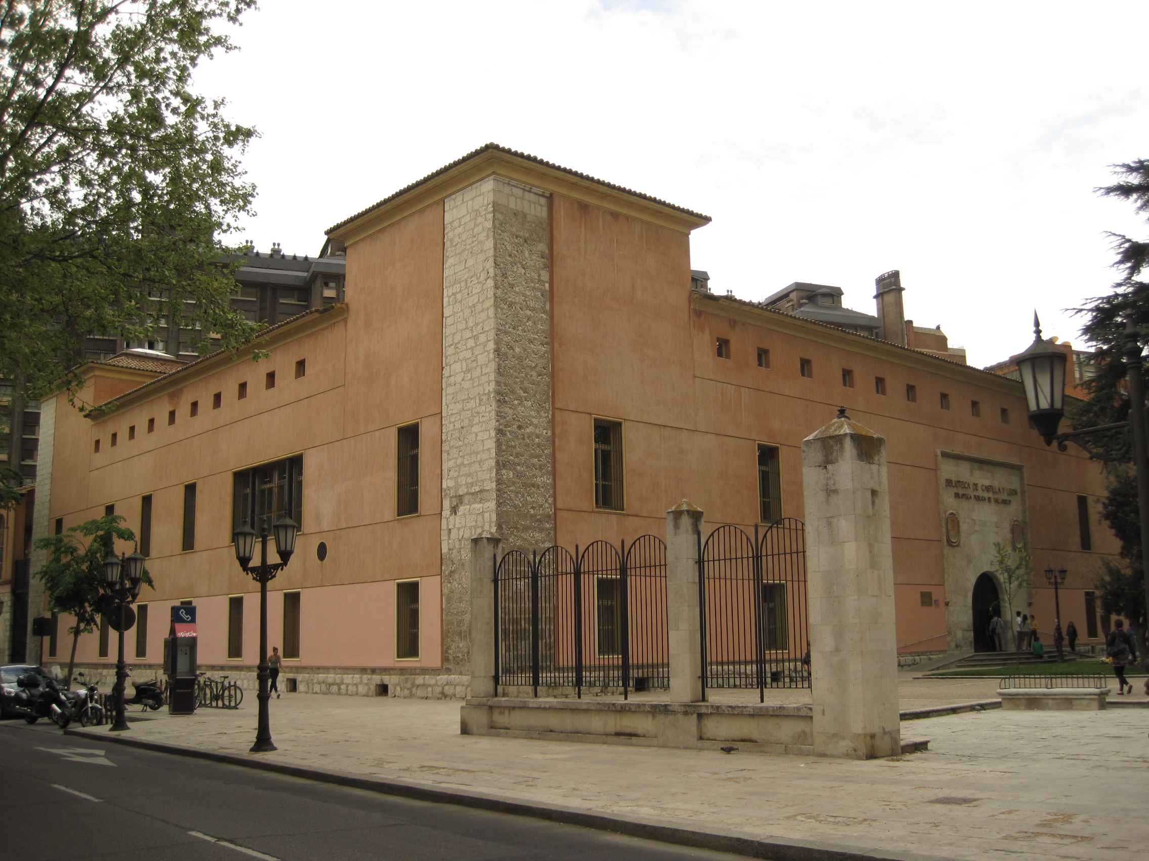 Casa del Duque de Benavente, actual biblioteca pública. Valladolid, España.